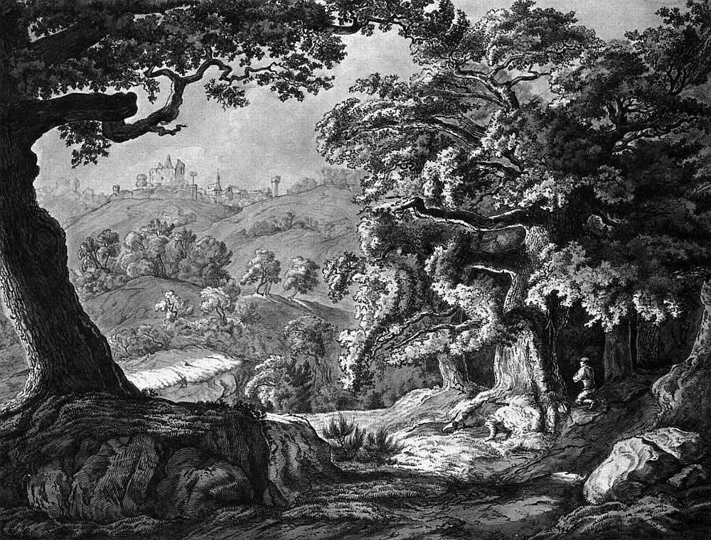 Fohr, Carl Philipp: Lindenfels, Blick auf die Stadt und die Ruine der Burg aus dem Odenwald heraus